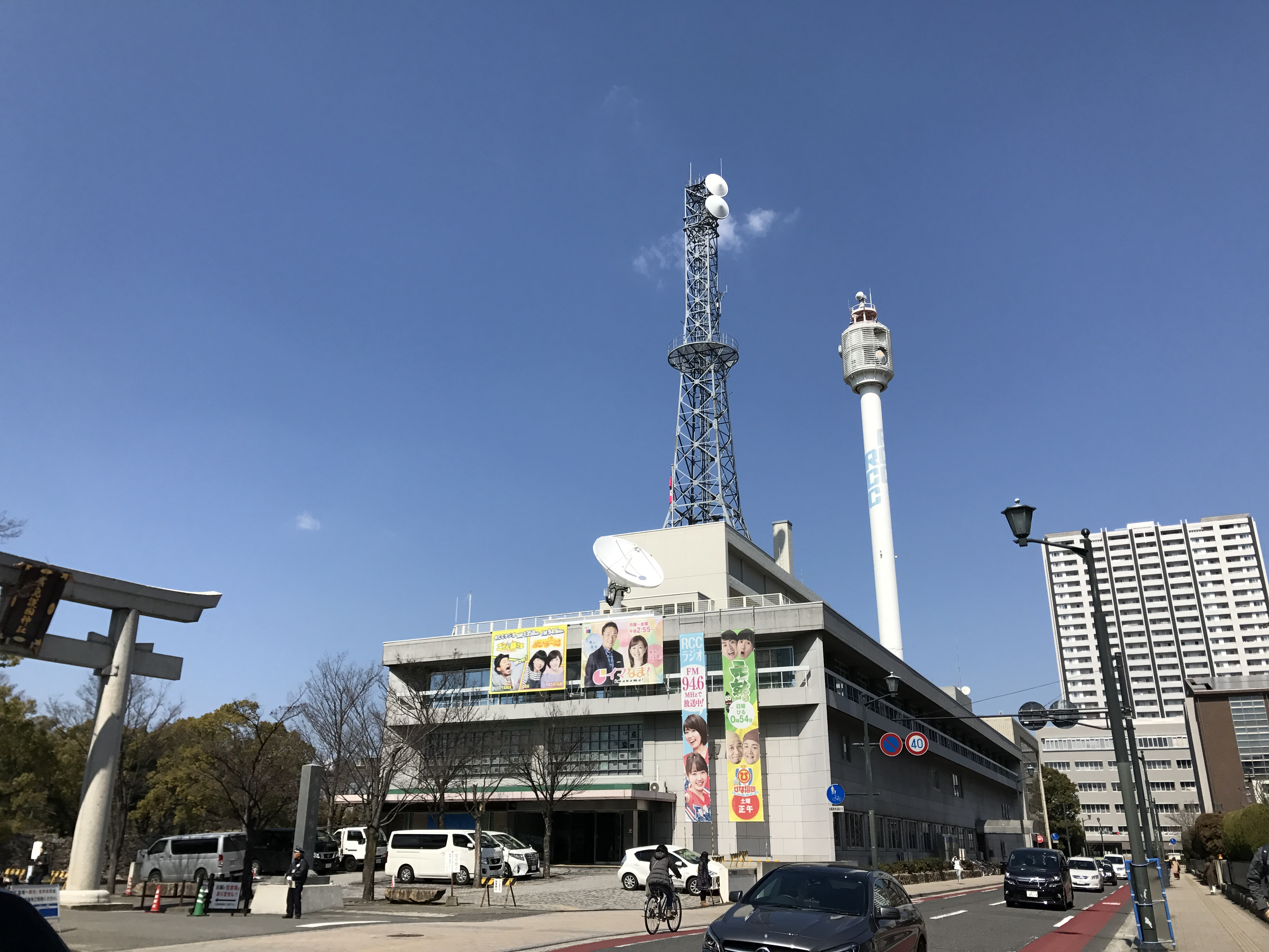 中国放送本社